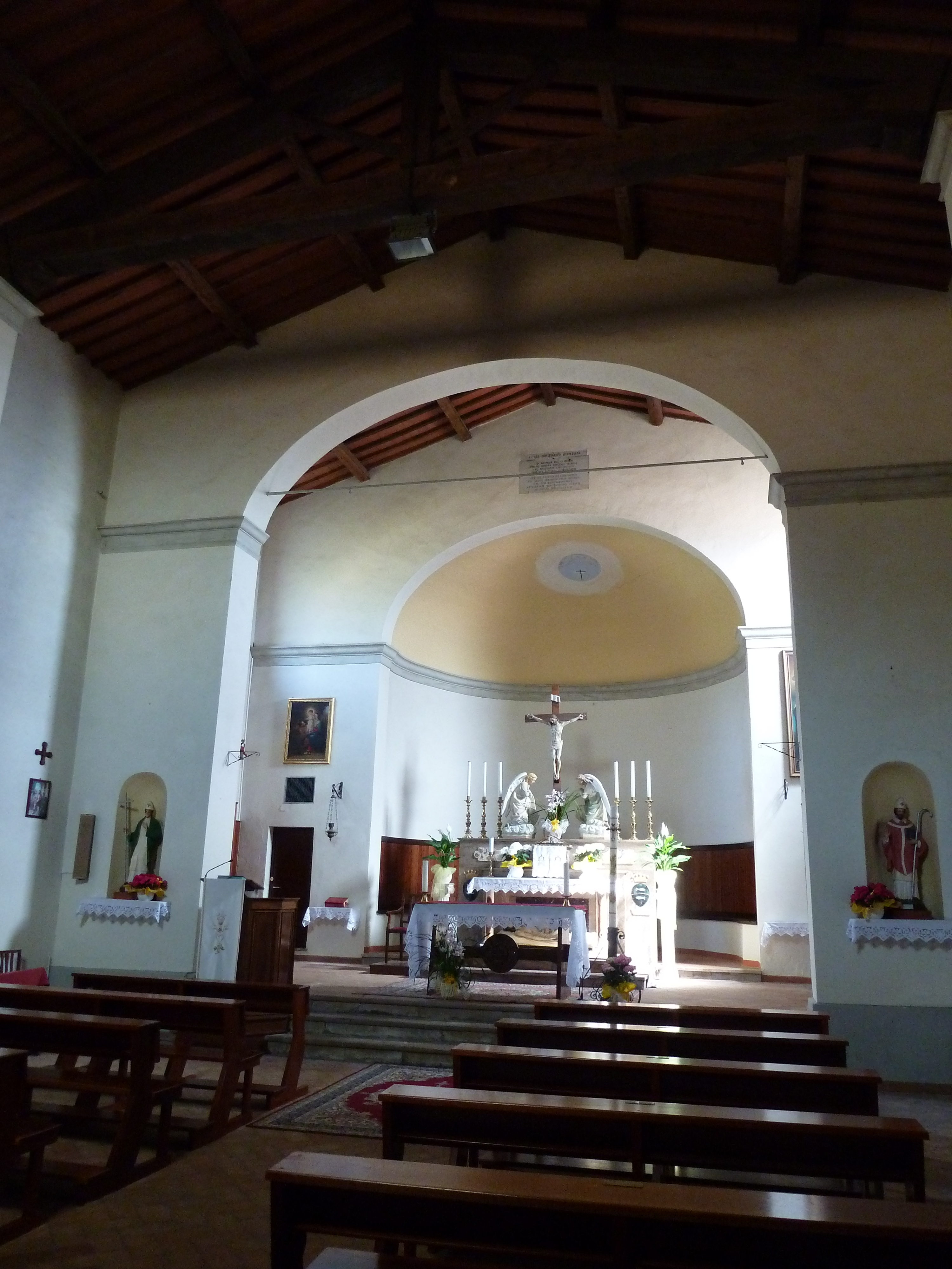 Interno della chiesa di S. Andrea in Alliano a Iano (Montaione - Firenze)